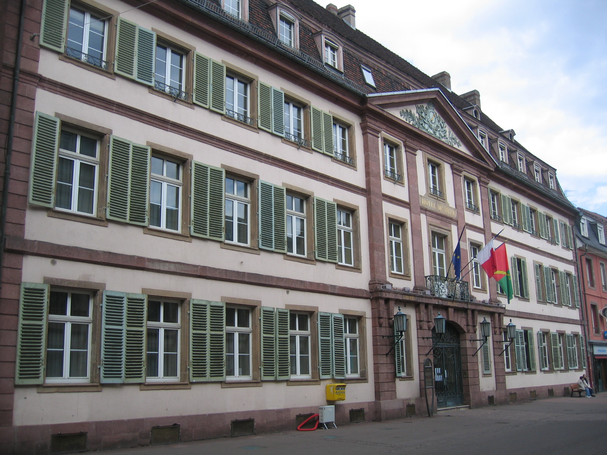 Le bâtiment ancien de la Mairie avec les bureaux du maire et de ses adjoints